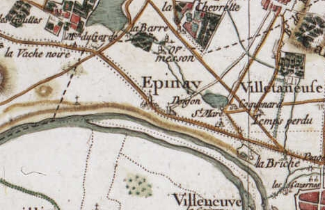 Épinay-sur-Seine (France) - Carte de Cassini, vers 1780